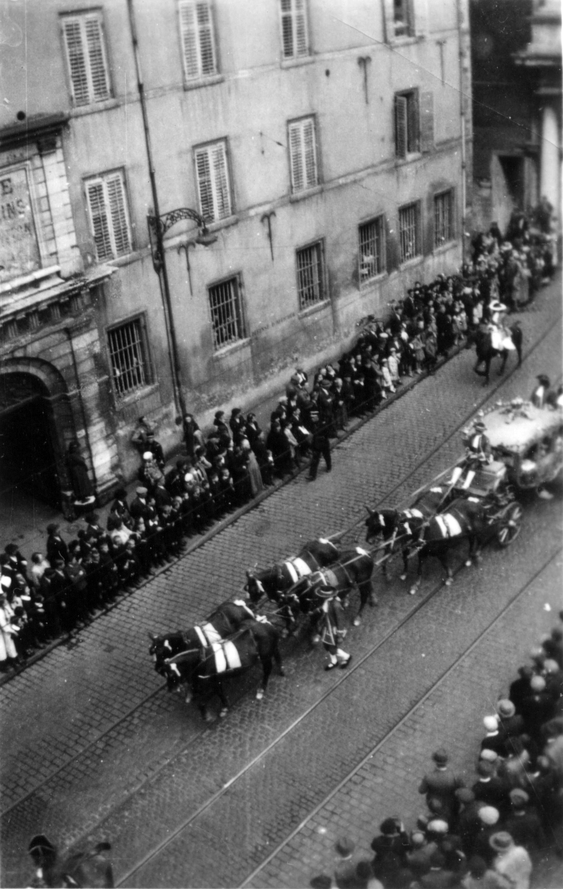 défilé rue Saint-Dizier lors du mariage Otto de Habsbourg-Lorraine.